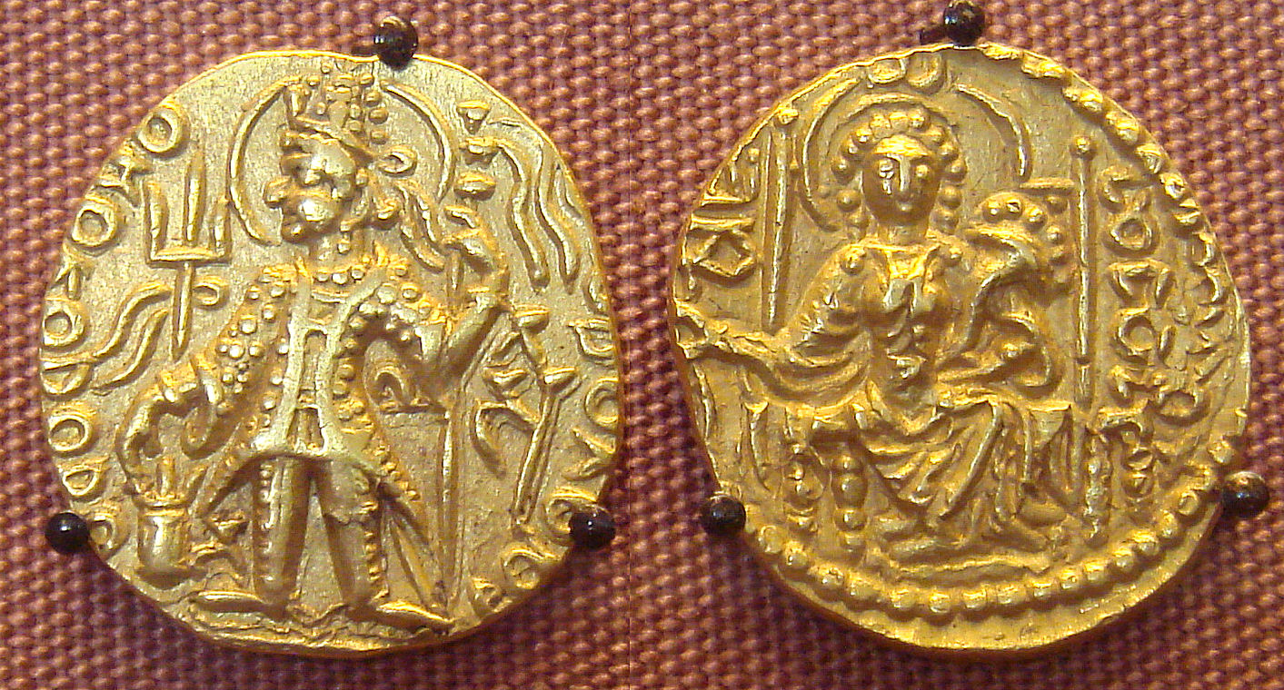 Vasudeva II